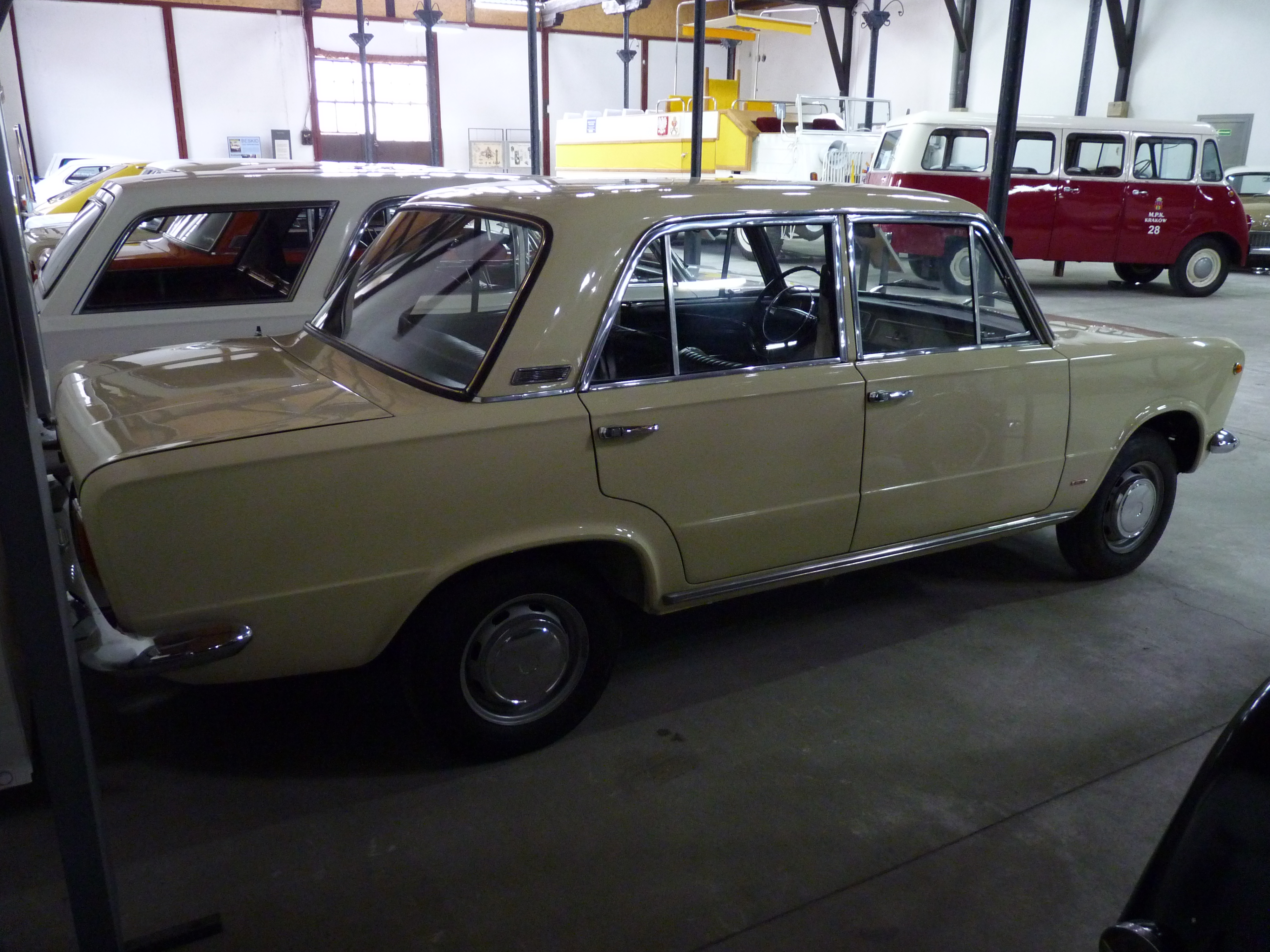 Polski Fiat 125p at the Muzeum Inżynierii Miejskiej in Kraków.JPG